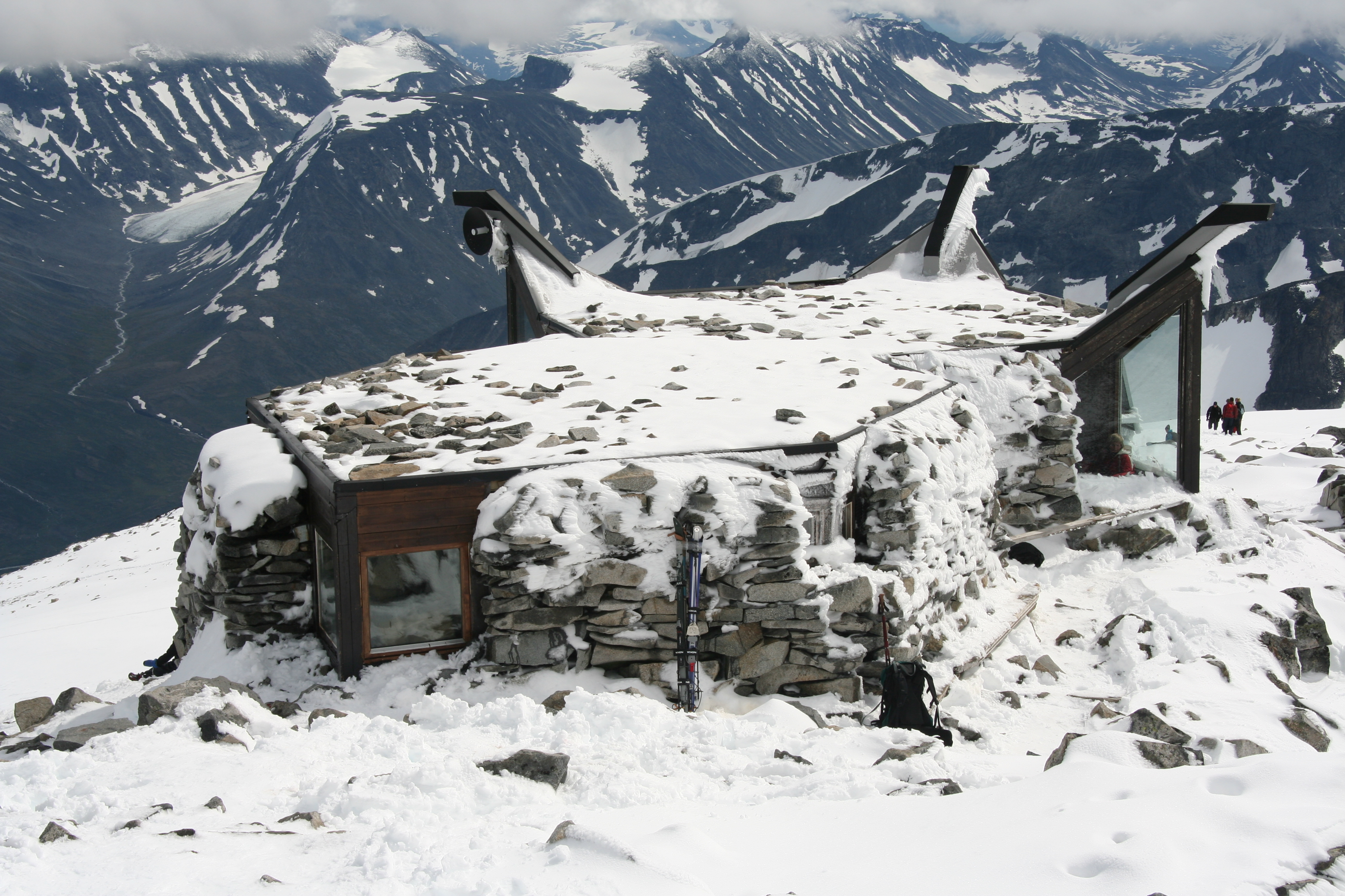 Galdöpiggens topp